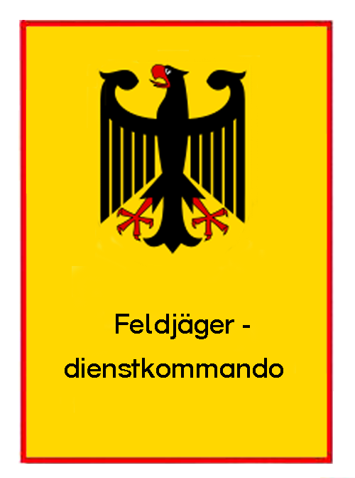 Kennschild Feldjägerdienstkommando